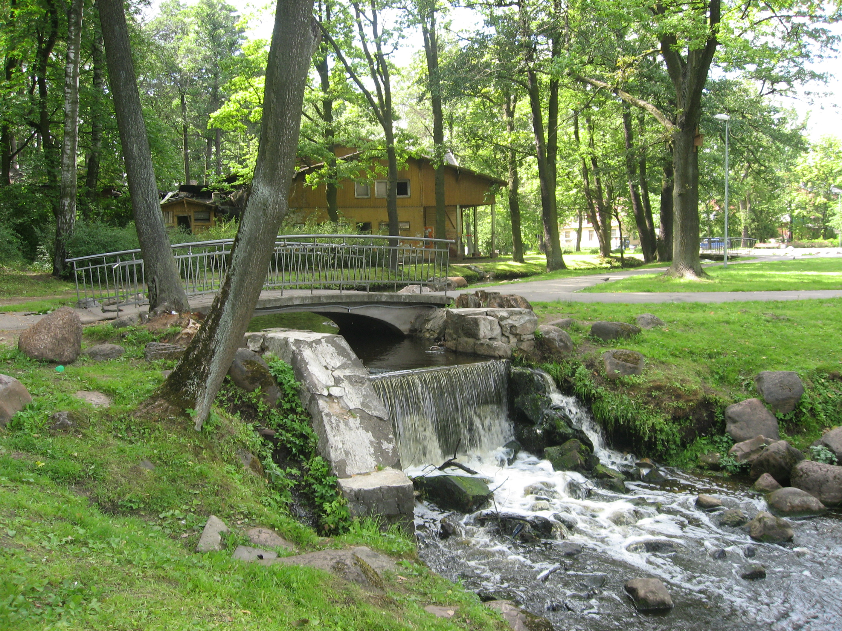 Arkādijas parks, Riga